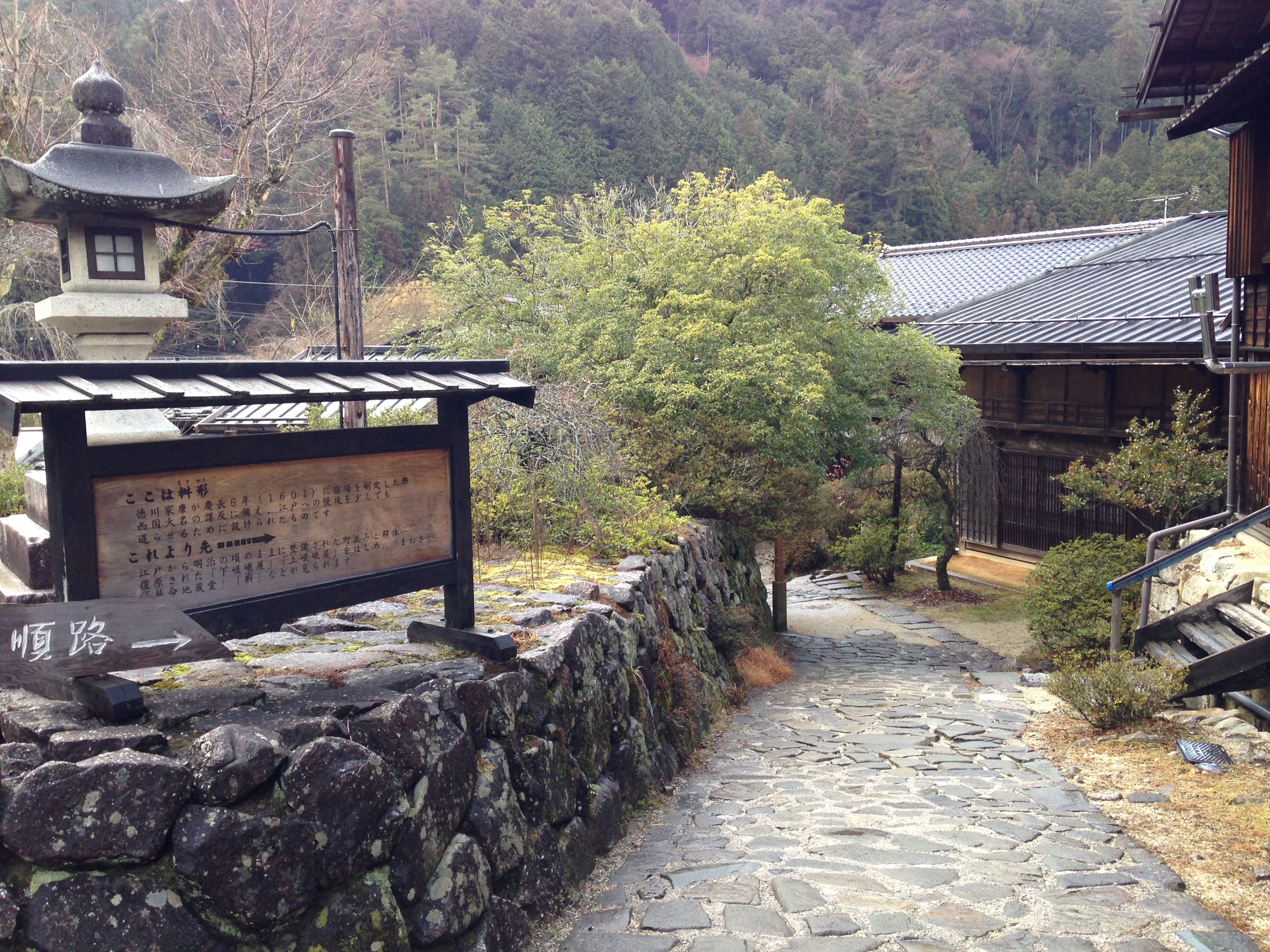 妻籠宿・枡形